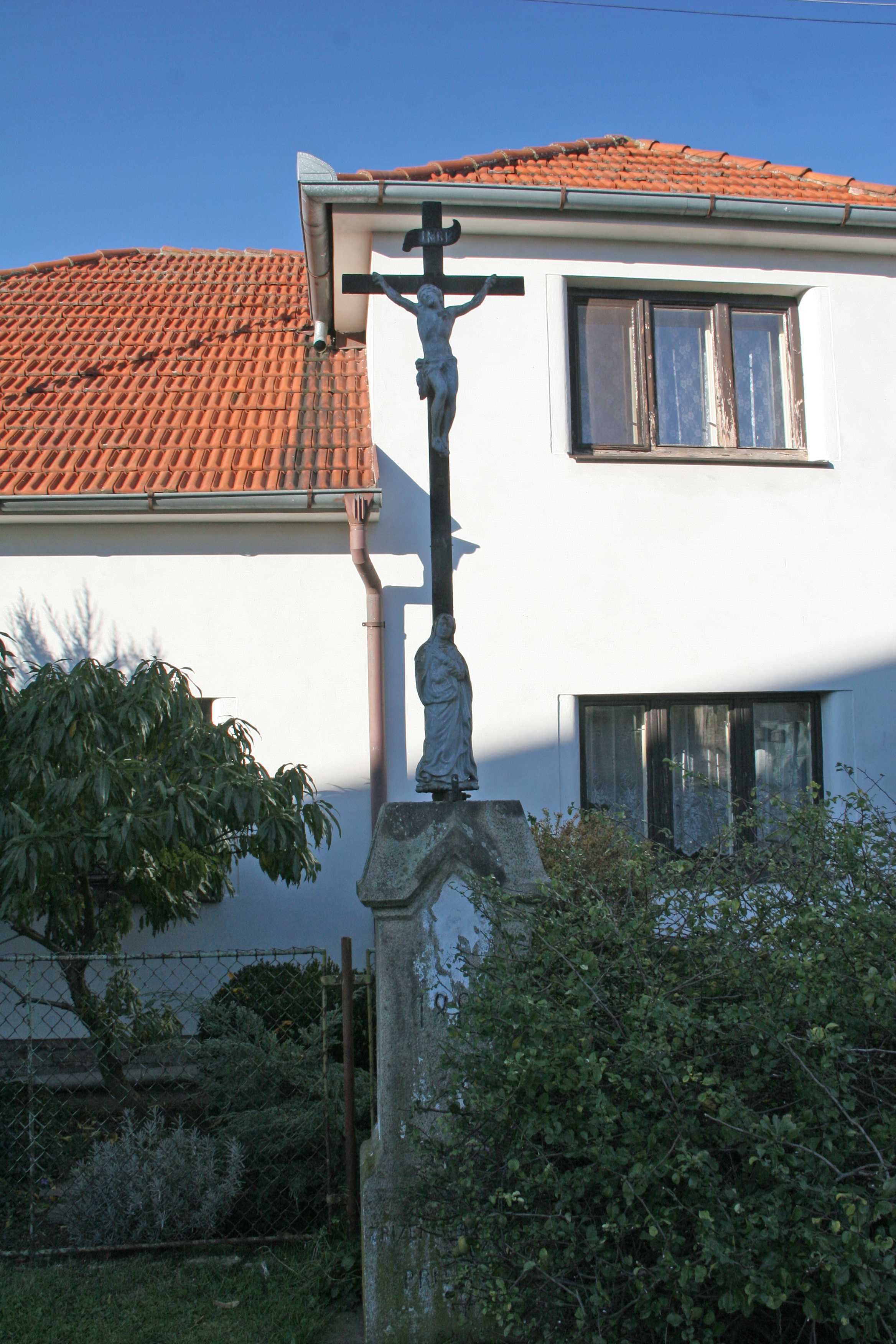 Vlačice kříž